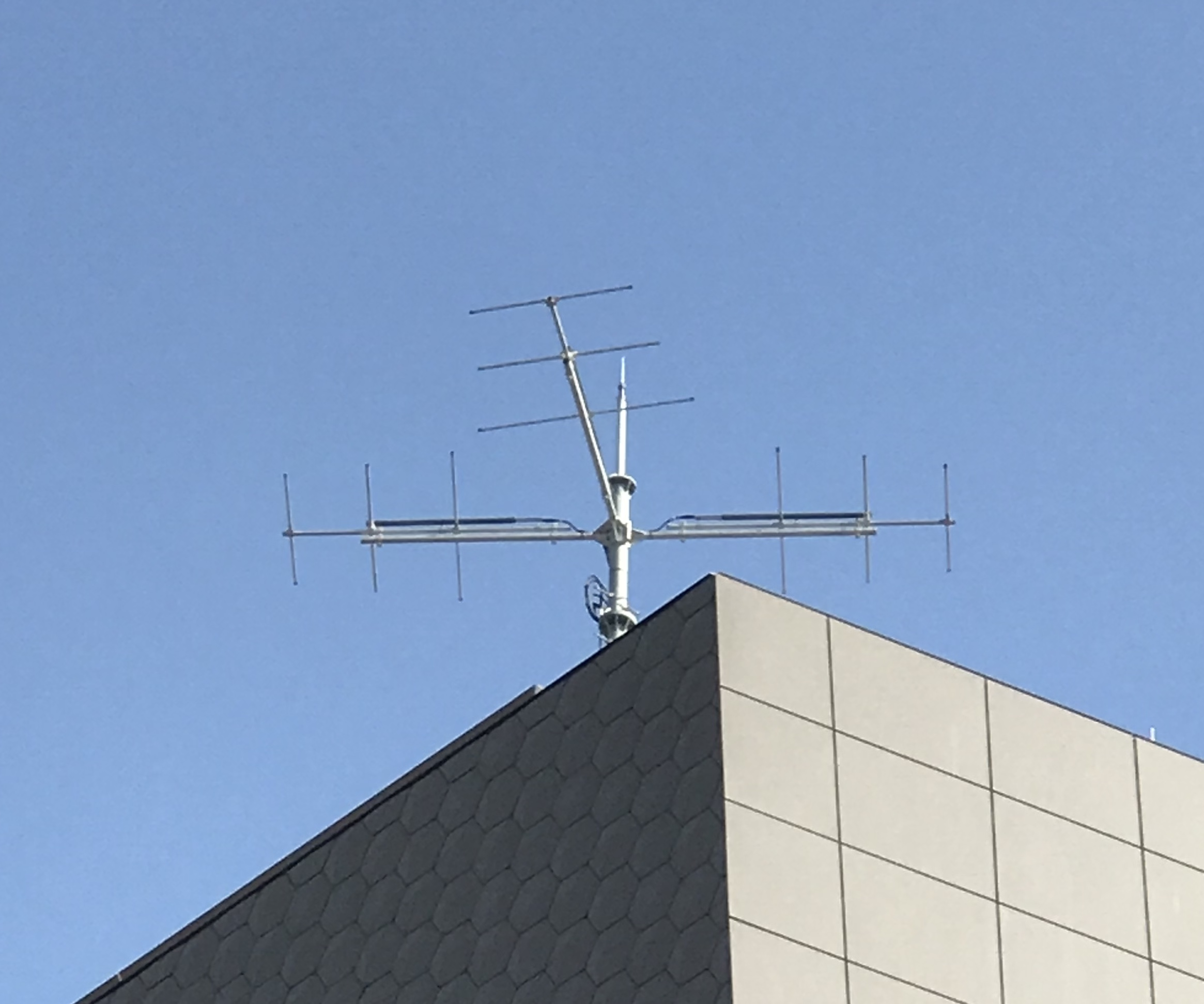 東急プラザ表参道原宿屋上にある「渋谷のラジオ」の送信アンテナ